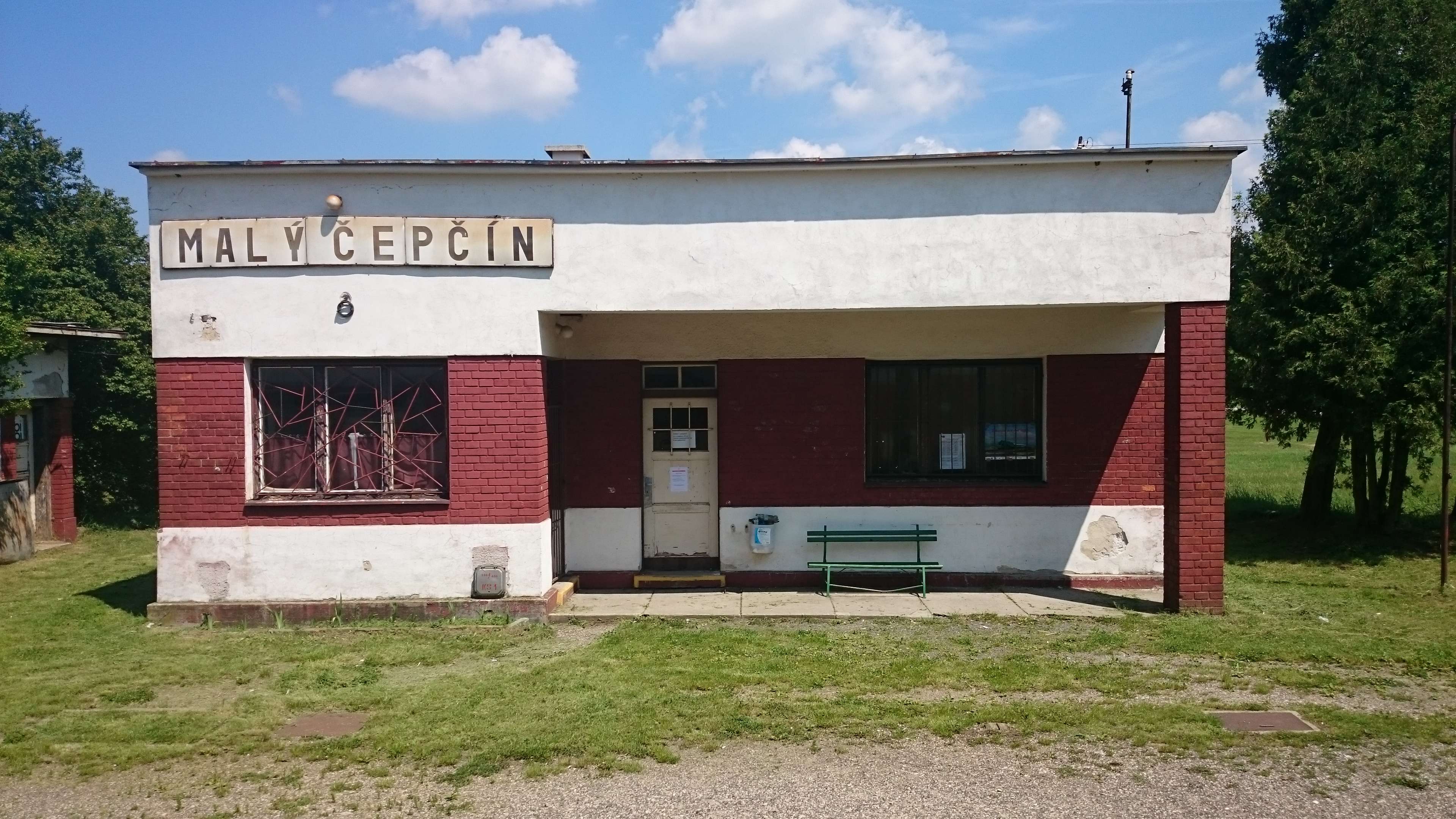 Fotografia budovy železničnej zastávky Malý Čepčín, vyhotovená z vlaku zastavujúcom na tejto zastávke.